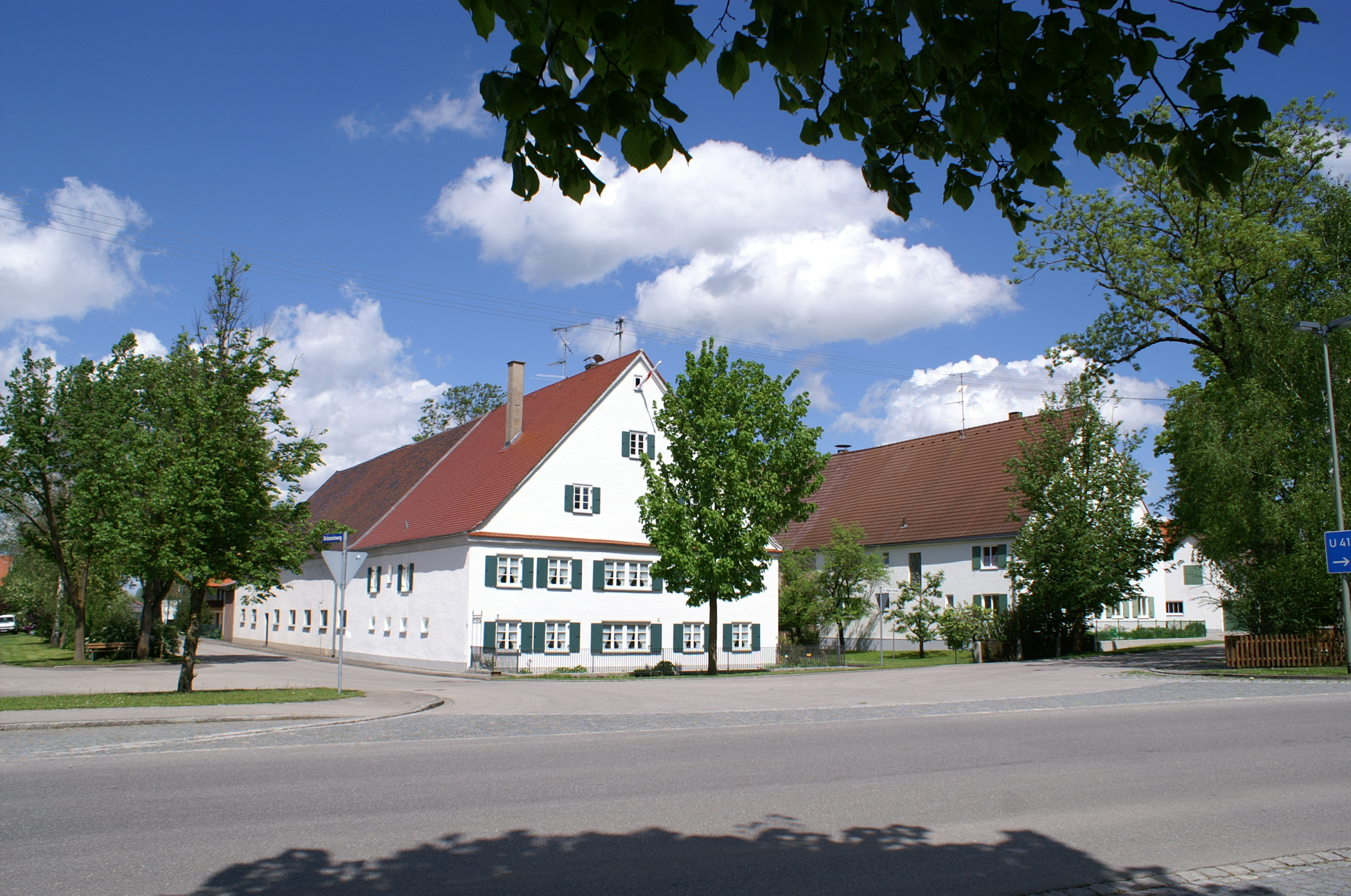 St.-Alban-Str. 1 in Honsolgen, Stadt Buchloe